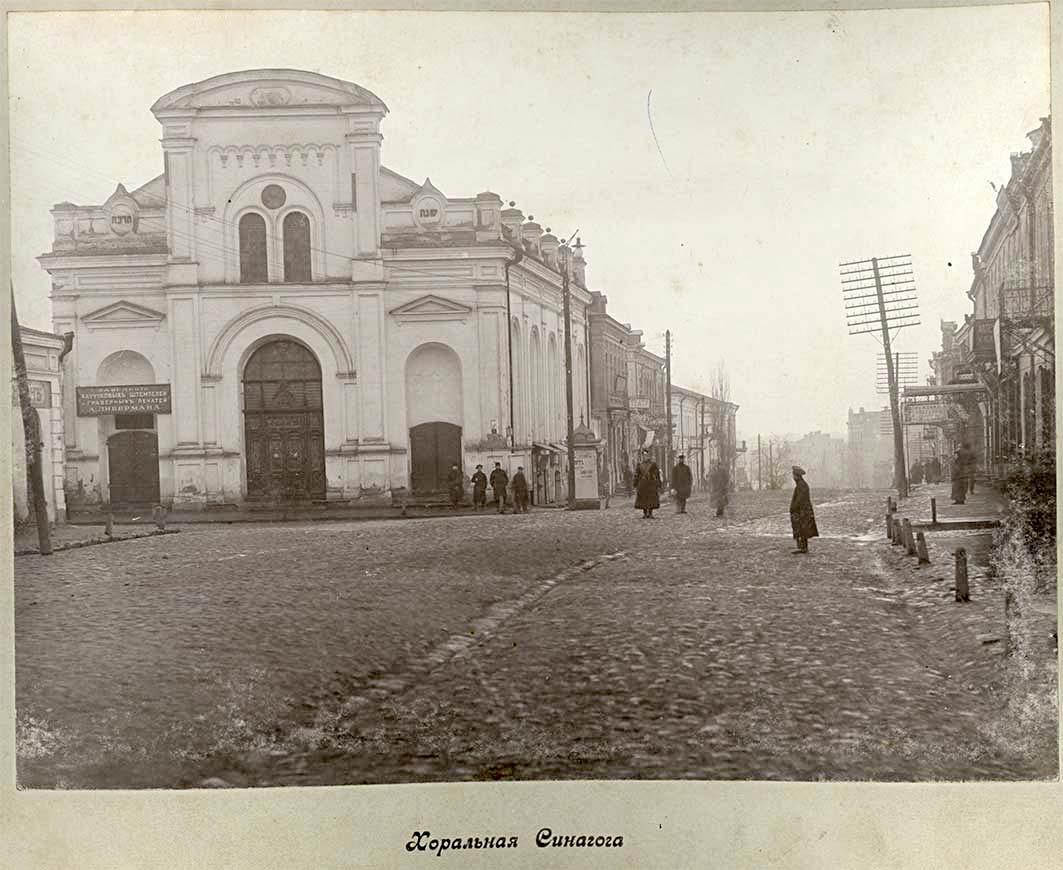 Хоральная синагога в Бердичеве.